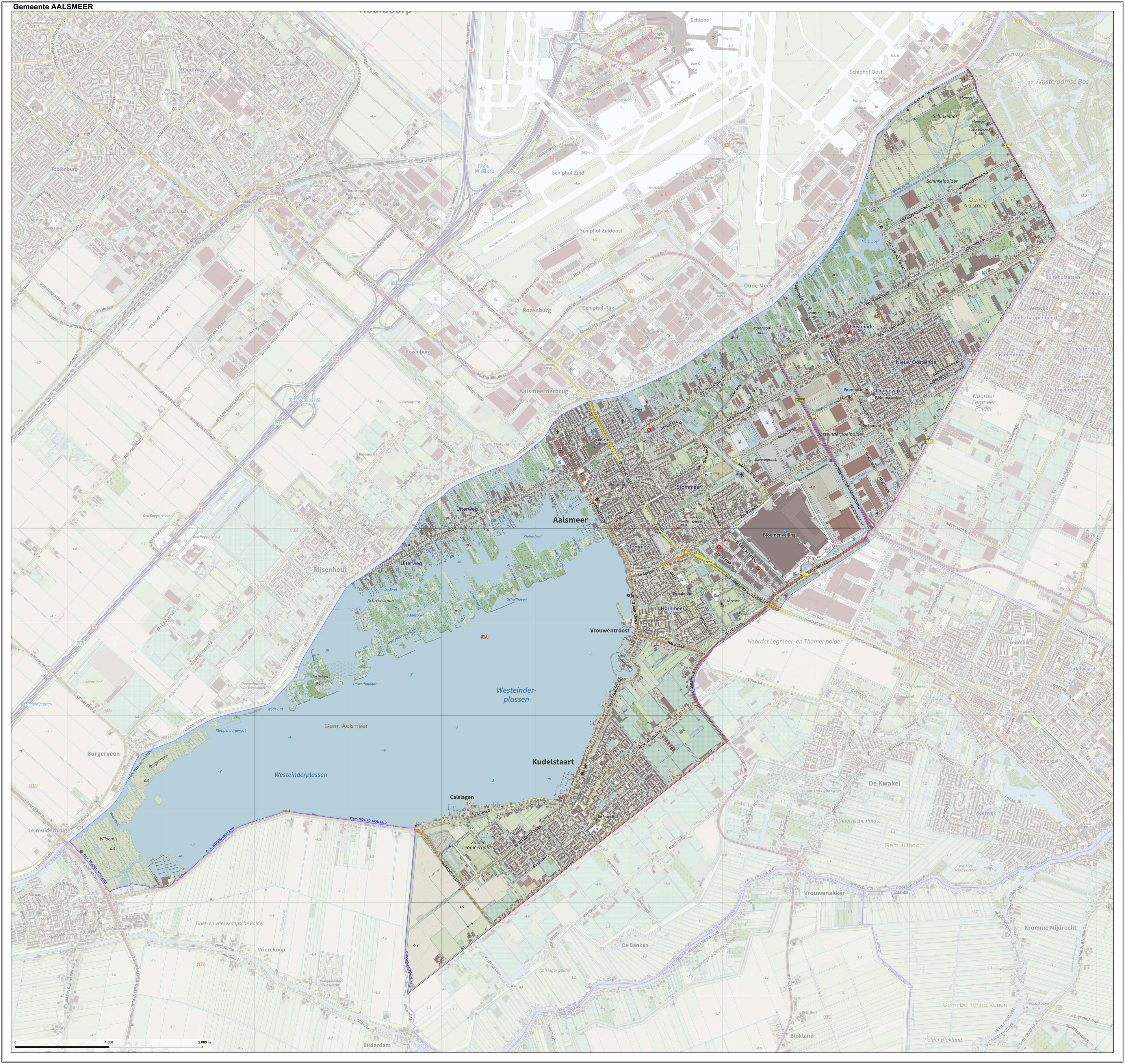 Topografische gemeentekaart per april 2017. Resolutie: 400 pixels/km. Kaartbeeld samengesteld uit de open geodata van de Top10NL en Top25namen (Kadaster), Creative Commons BY licentie. Gebouwvlakken uit open geodata BAG extract. Wegen uit de OpenStreetMap, OpenStreetMap community. Reliëfschaduw uit de Actuele Hoogtekaart AHN2. Samenstelling en kleurenschema: Jan-Willem van Aalst, met QGIS. Zie ook de Legenda.